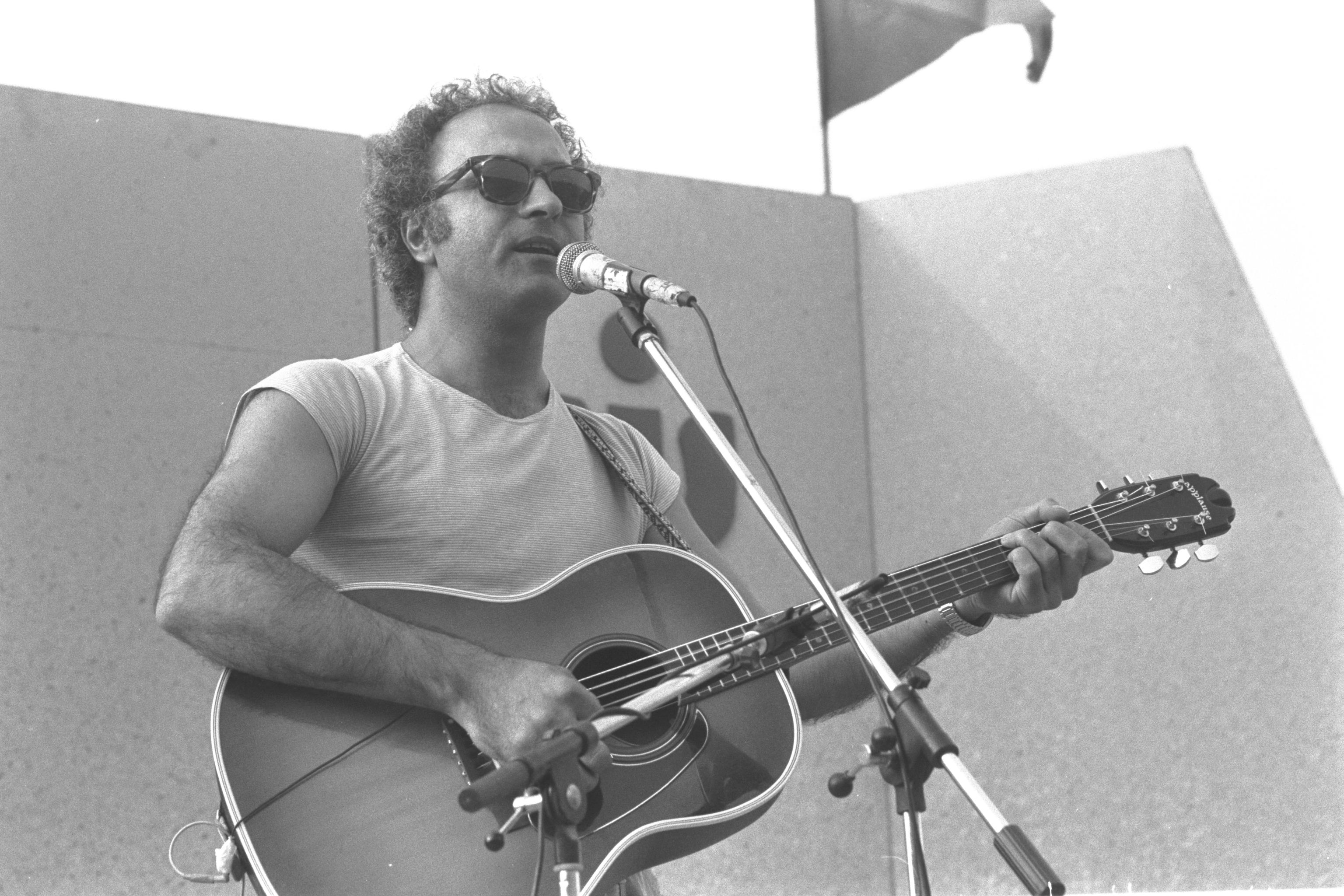 Singer Miki Gabrielov performing at the Israel Peace Festival in Neve Shalom. מיקי גבריאלוב בהופעה בפסטיבל השלום בנווה שלום Photo: HERMAN CHANANIA, 04/10/1985